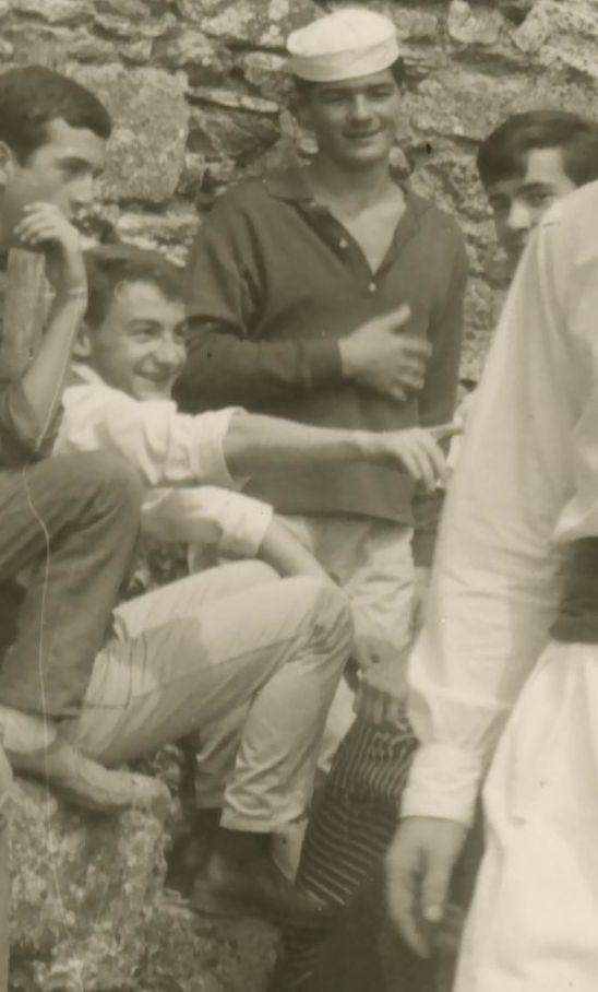 Pierre Desproges (2ème personne sur la gauche) se moquant de son frère Jacques (1ère personne sur la droite) lors de la kermesse au château de Châlus Chabrol le 26 septembre 1958. Au premier rang, Chantal Moratti, née Moins et un cavalier non identifié